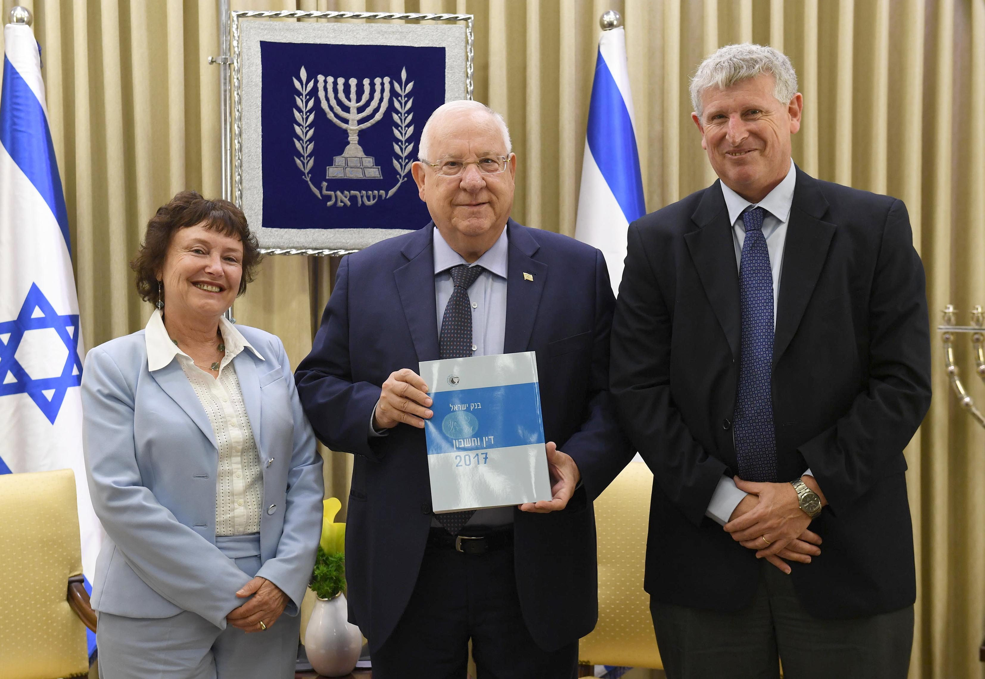 נשיא מדינת ישראל ראובן ריבלין מקבל את דו"ח בנק ישראל לשנת 2017, מידי ד"ר קרנית פלוג נגידת בנק ישראל. מימין מנהל חטיבת המחקר בבנק ישראל מישל סטרבצ'ינסקי